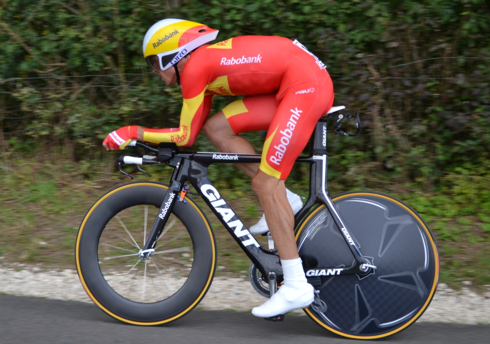 Luis-Leon Sanchez TDF2012